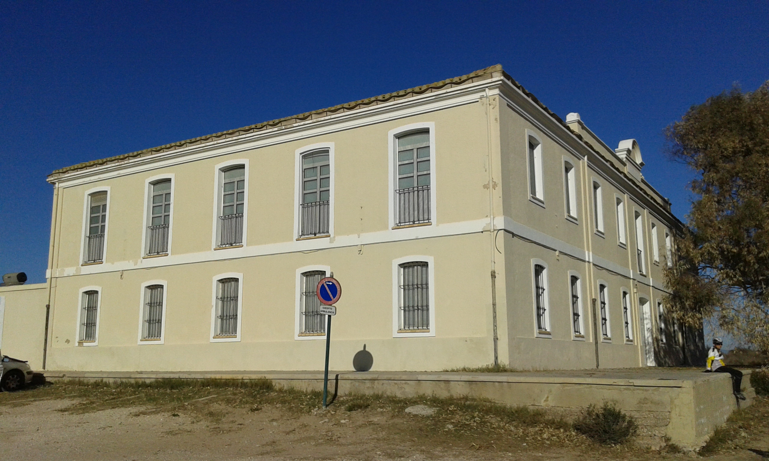 Casal d'Esplai de la Devesa del Saler, antiga caserna de carabiners.